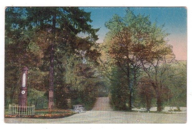 Widokówka z Lublina - Ogród Saski - aleja główna z nie istniejącym już zegarem z 1916 roku, wydawca SMP w Krakowie nr 4.